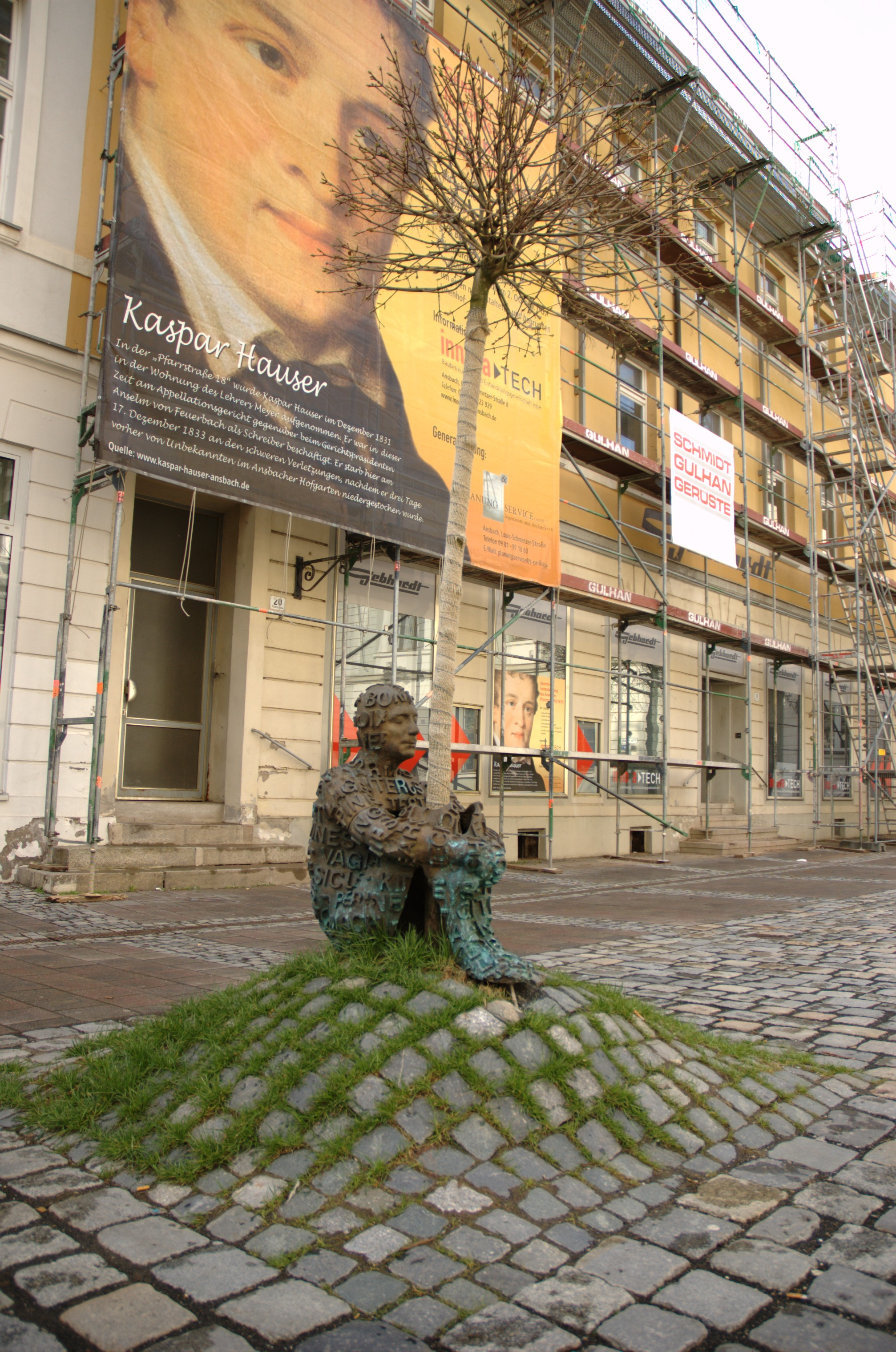 Kaspar Hauser, Montgelas-Platz Ansbach (Kaspars Baum, Bronzeskulptur von Jaume Plensa vor dem Wohnhaus Hausers in Ansbach)